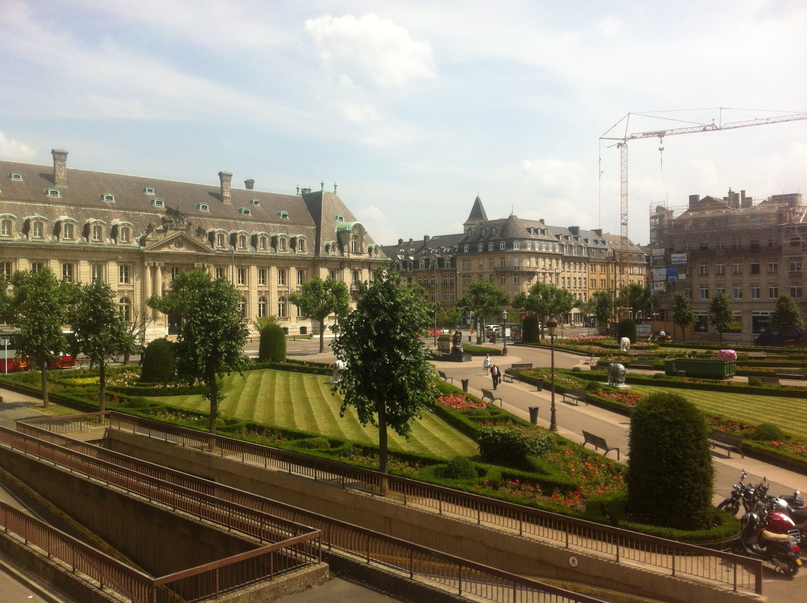 Place des Martyrs (Rousegäertchen) à Luxembourg.